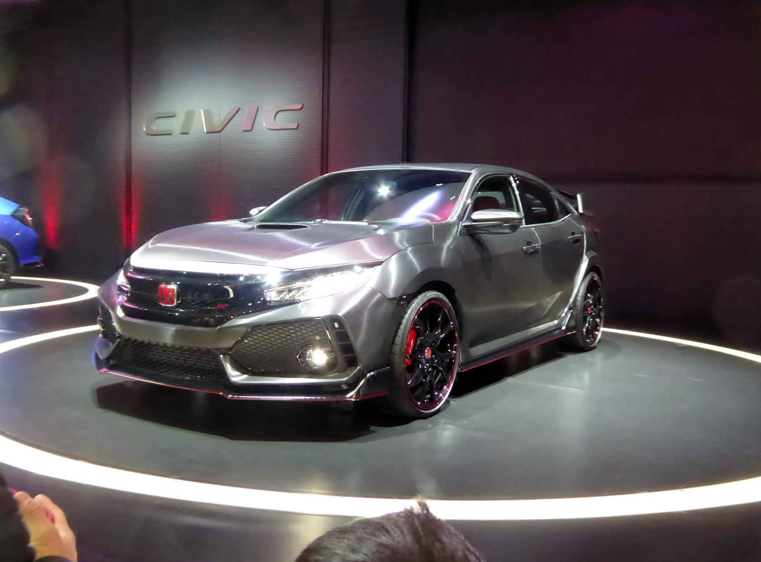 大阪オートメッセ2017に於いてホンダ・シビックタイプRプロトタイプを撮影。